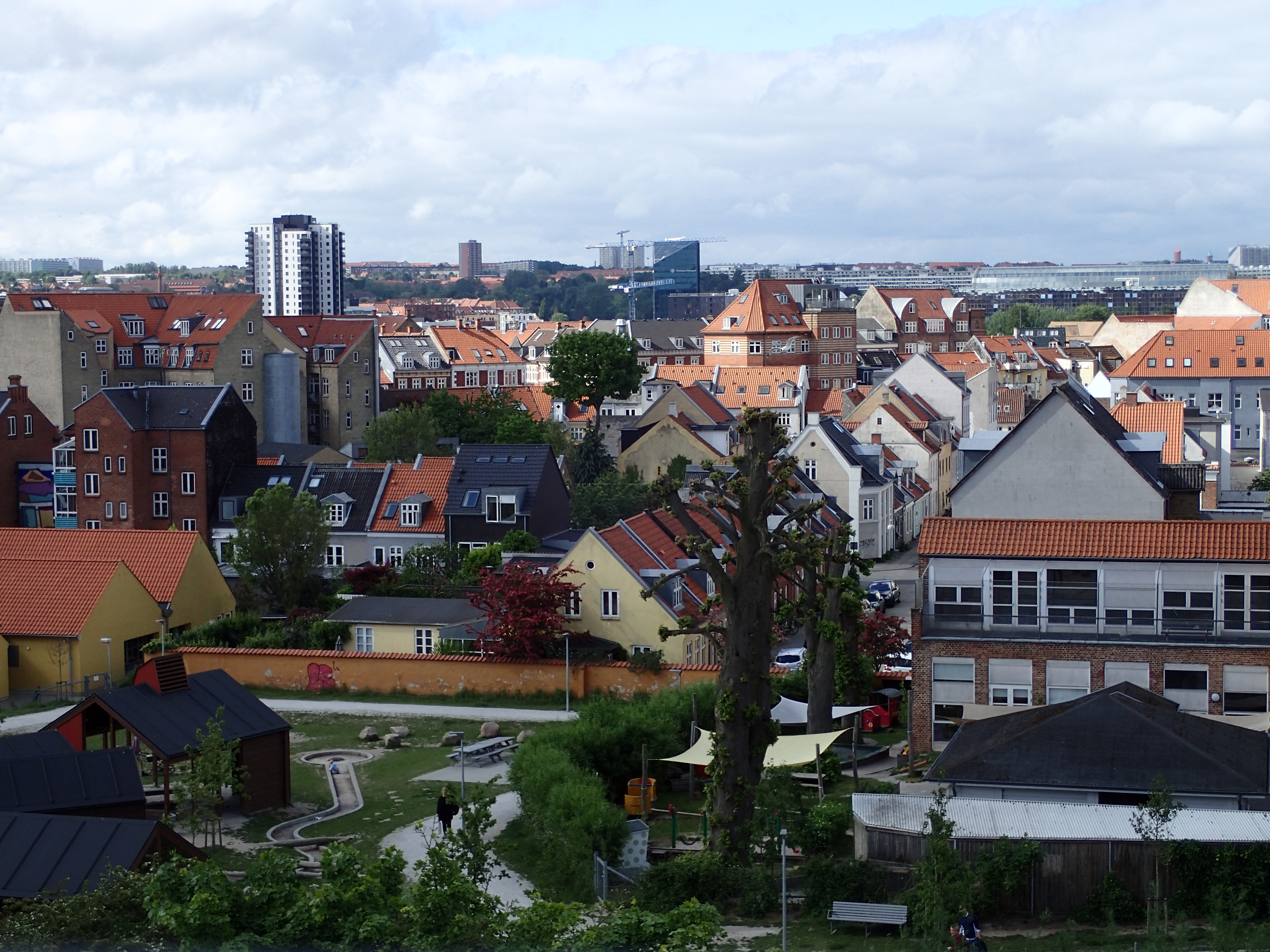 Aarhus skyline set fra Frederiksbjerg mod nord.